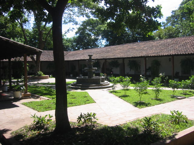 Vista de la plaza Interior del Museo. Su Arquitectura recuerda a una hacienda colonial. Departamento de Arqueología, CONCULTURA.